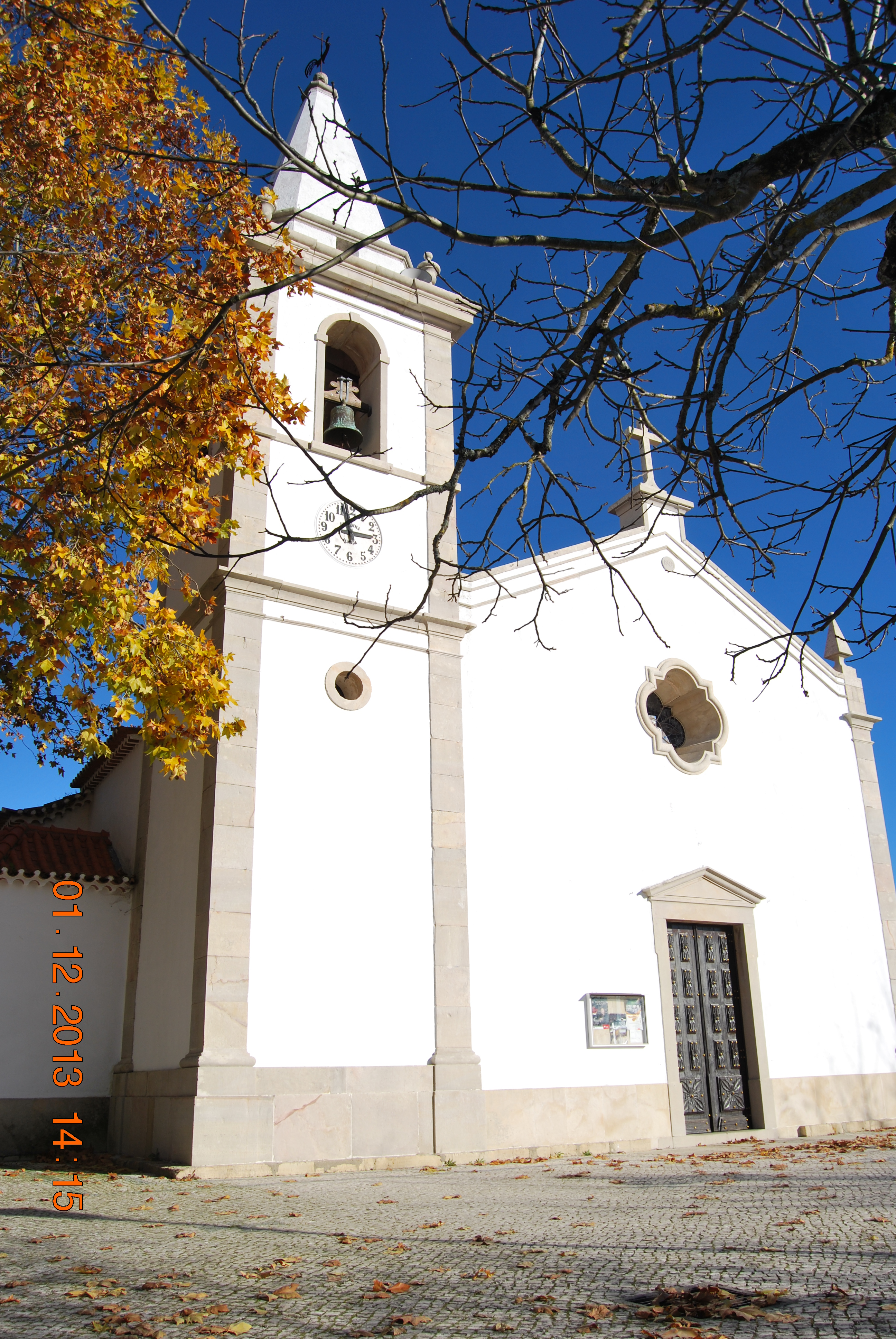 Igreja